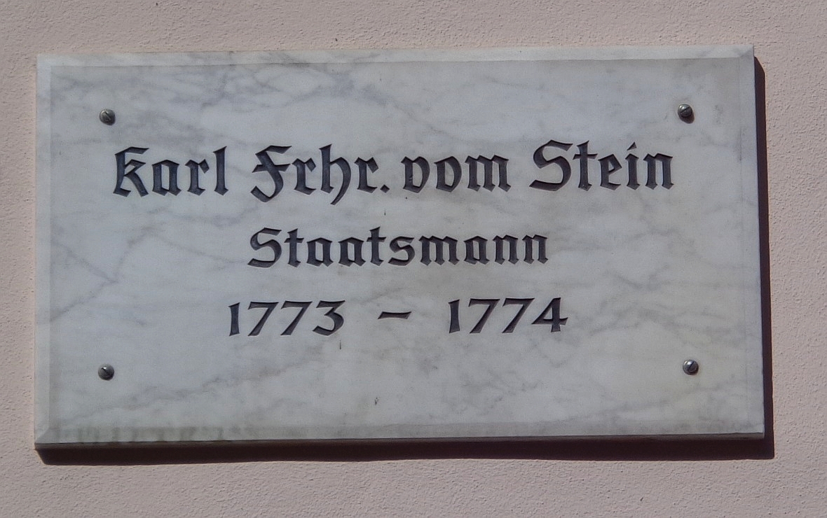 Göttinger Gedenktafel für Karl vom und zum Stein (Weender Straße 23-25)